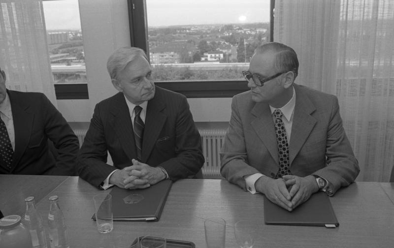 Unterzeichnung eines deutsch-amerikanischen Abkommens über Sicherheitsanforderungen bei Kernenergie-Kraftwerken im Bundesministerium des Innern (Unterzeichner: Staatssekretär Dr. Günther Hartkopf, Bundesministerium des Innern und Richard T. Kennedy, Commissioner, Nuclear Regulatory Commission)